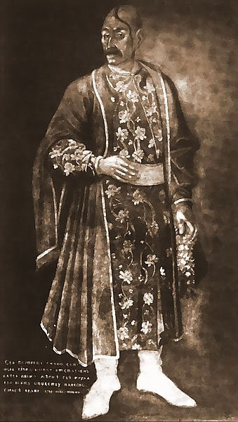 Запорожец Иван Шиян. Картина неизвестного художника 1784 г. Оригинал картины находится в одесском историко-краеведческом музее.